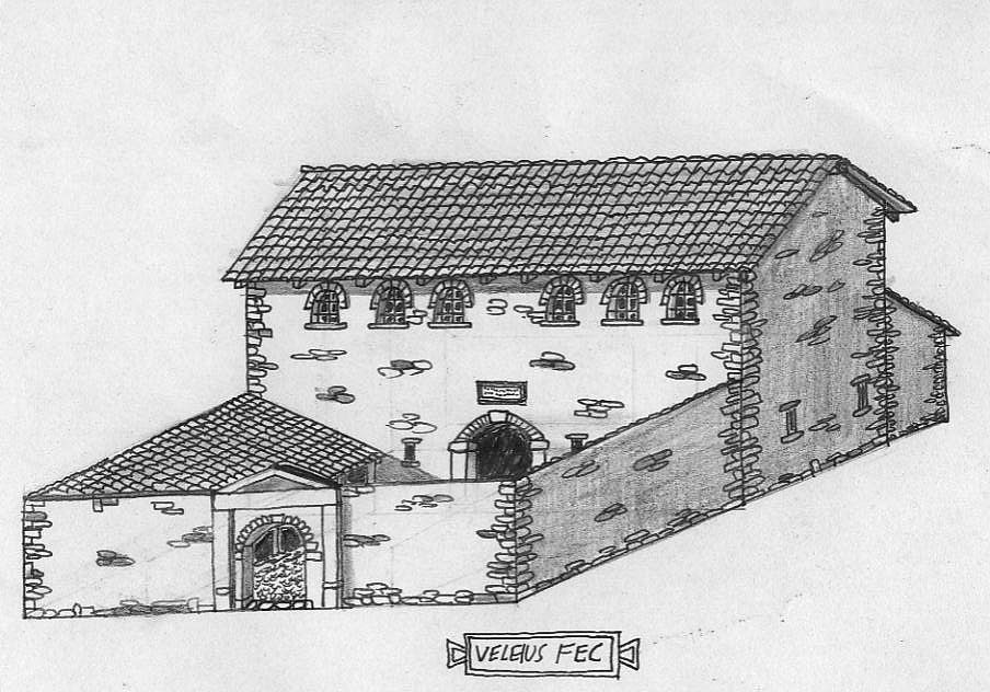 Kommandogebäude (principia) des Kastell Arbeia/South Shilds (3.Jahrhundert)